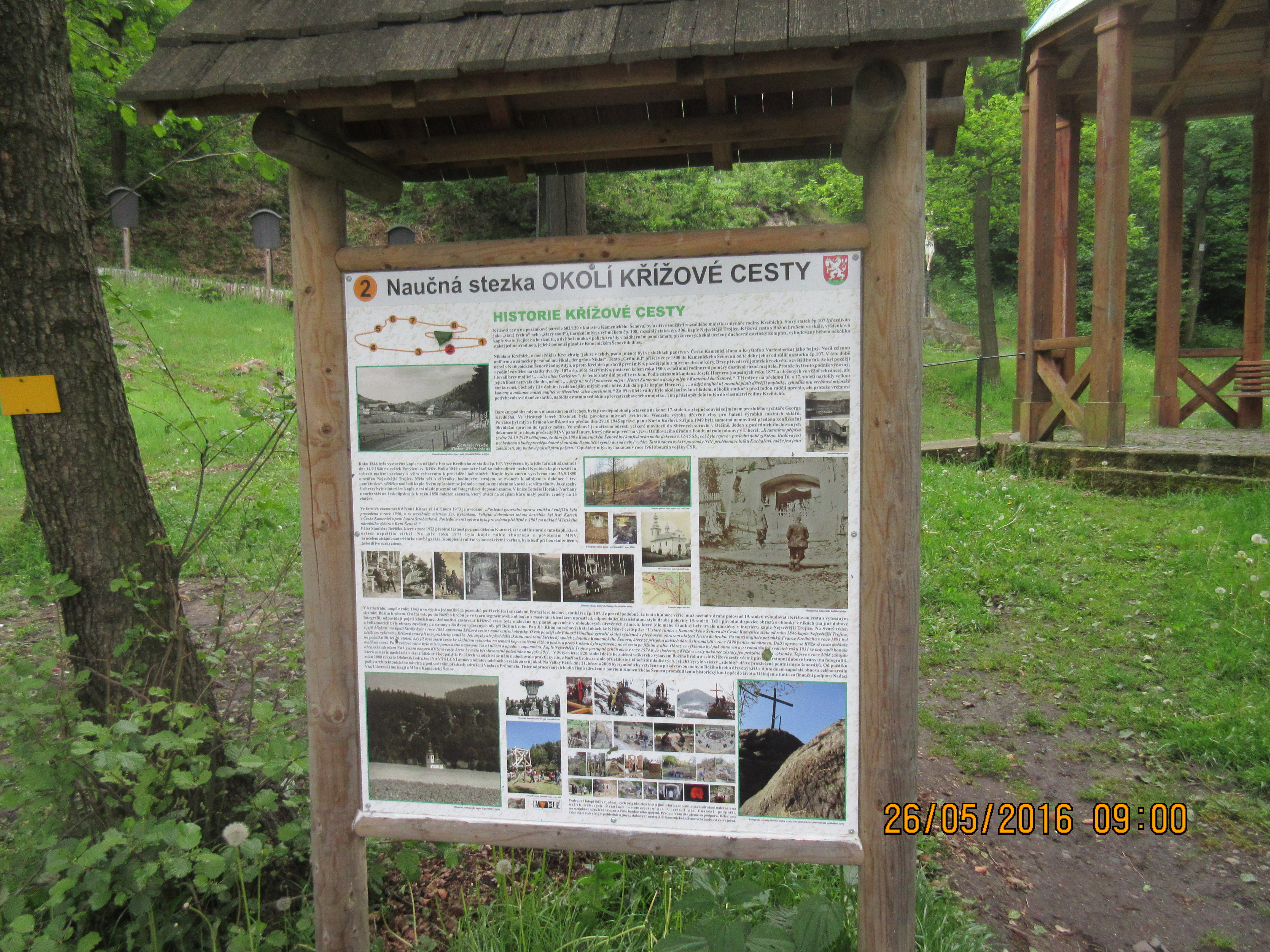 Zastavení na naučné stezce Okolím křížové cesty, severní okraj města Kamenický Šenov